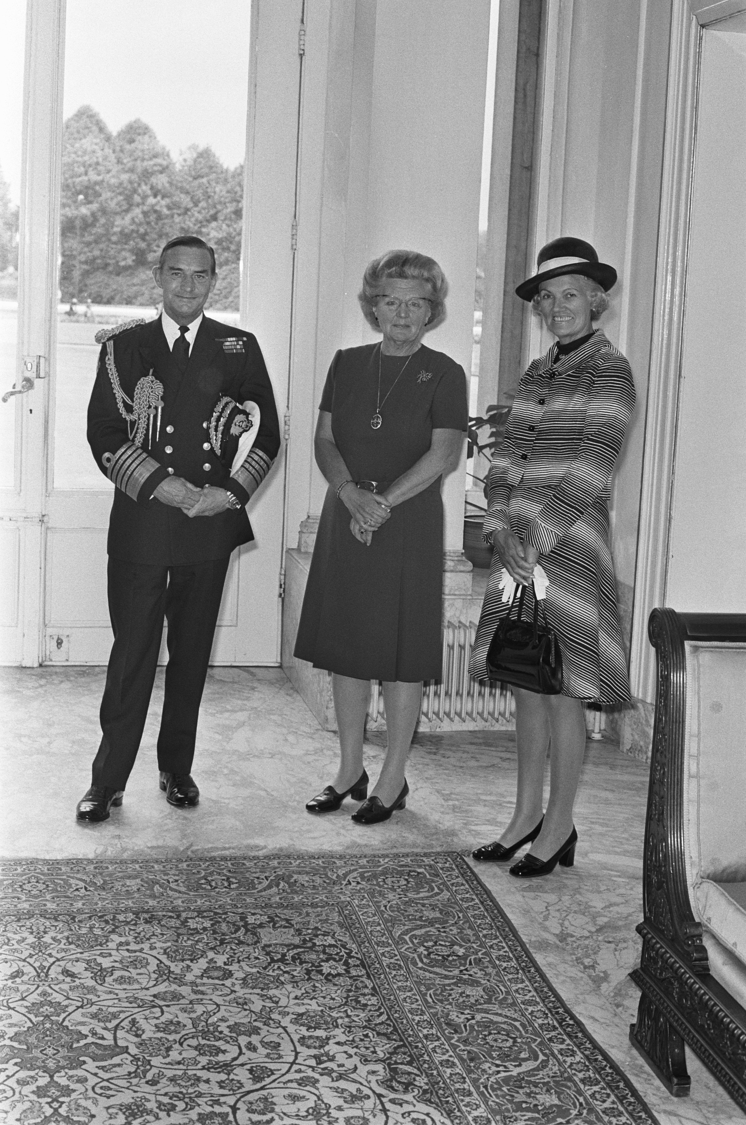 Collectie / Archief : Fotocollectie Anefo Reportage / Serie : Koningin Juliana ontvangt het Nederlands elftal Beschrijving : Koningin Juliana ontvangt op paleis Soestdijk de voorzitter van het Militair comité van de NAVO, admiraal sir Peter Hill-Norton en diens echtgenote Datum : 4 juli 1974 Locatie : Baarn, Utrecht (provincie) Trefwoorden : admiraals, koninginnen Persoonsnaam : Hill-Norton, Peter, Juliana (koningin Nederland) Instellingsnaam : NAVO Fotograaf : Fotograaf Onbekend / Anefo, [onbekend] Auteursrechthebbende : Nationaal Archief Materiaalsoort : Negatief (zwart/wit) Nummer archiefinventaris : bekijk toegang 2.24.01.05 Bestanddeelnummer : 927-3042